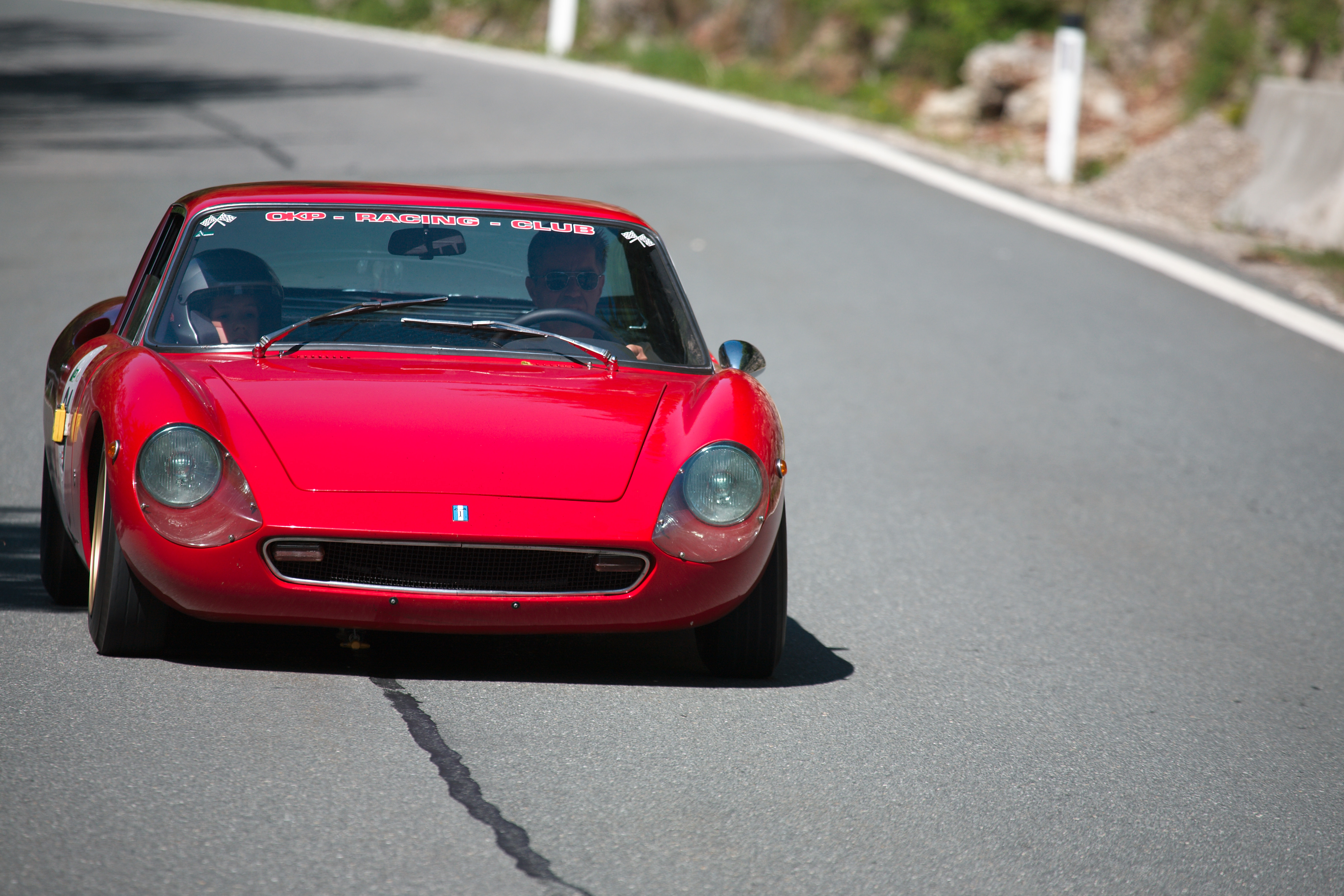 De Tomaso Vallelunga at Gaisbergrennen 2009